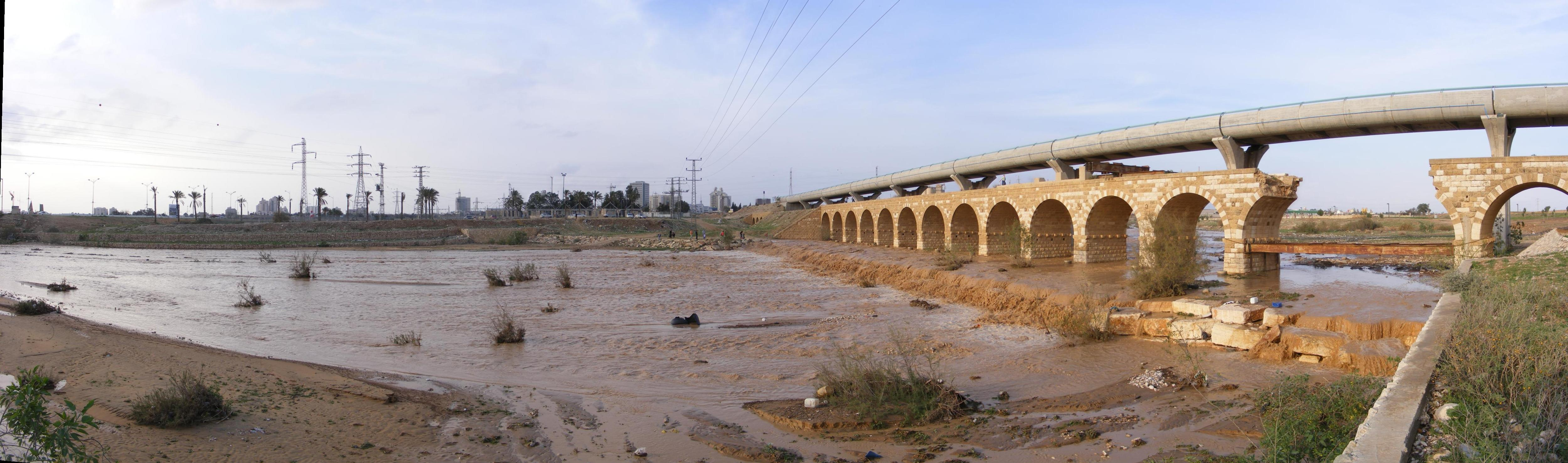 גשר קשתות ארוך שנבנה מאבן בשנת 1916 בתקופת מלחמת העולם הראשונה על ידי הצבא העות'מאני, סמוך לעיר באר שבע, על-מנת להוליך חיילים וציוד צבאי לסיני כחלק מהמאמץ הלוגיסטי במערכה על ארץ ישראל.